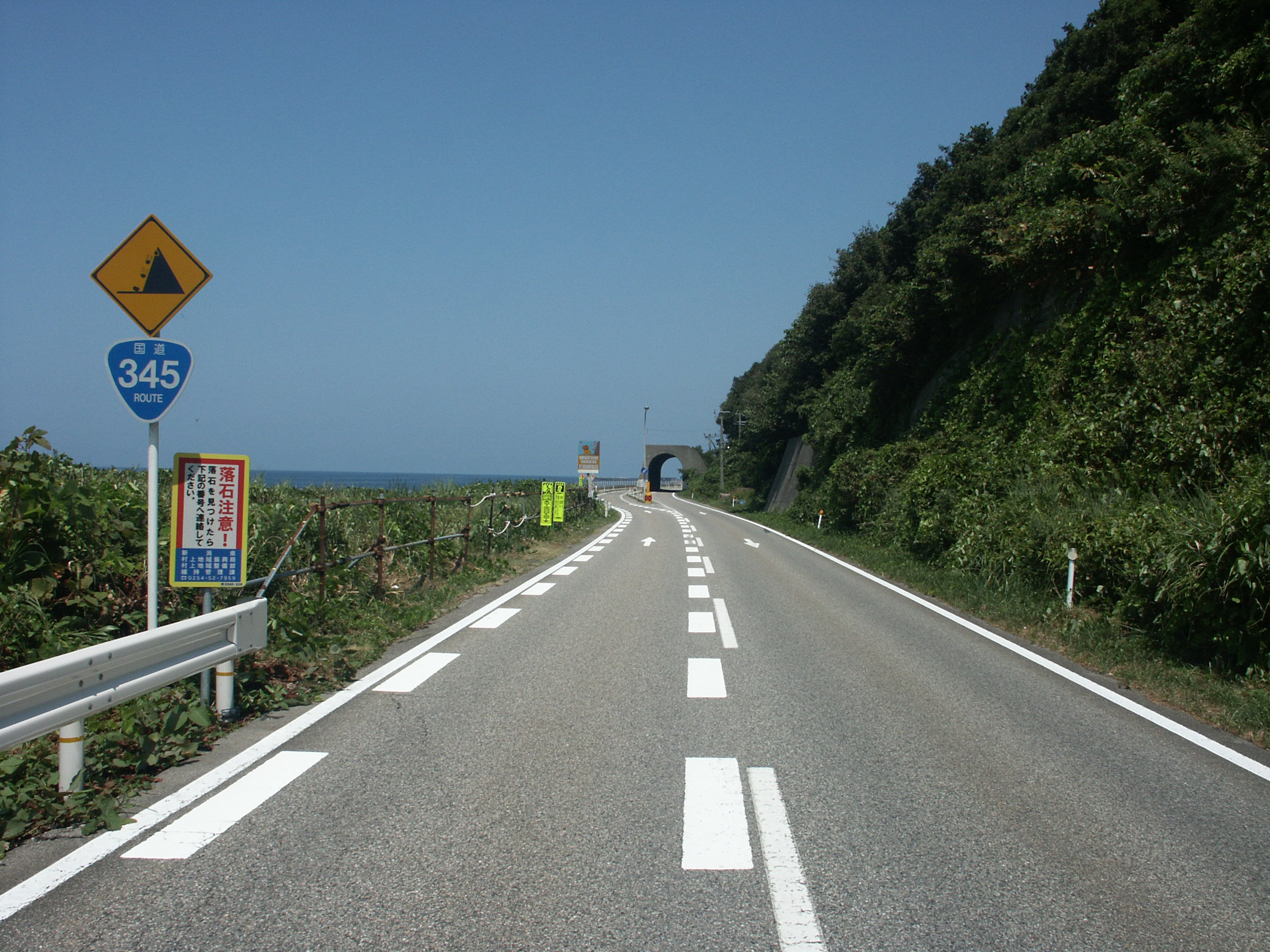 国道345号線新潟県村上市芦谷付近（鶴岡方面を撮影）